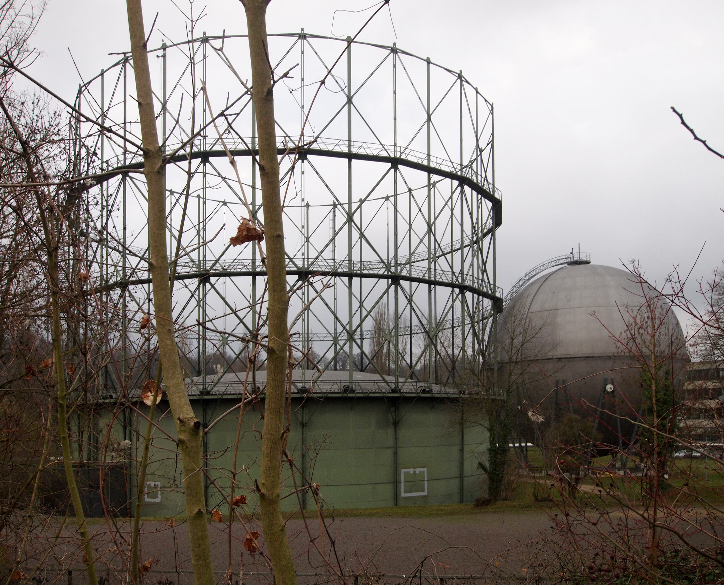 Gasbehälter beim Heizkraftwerk Enzaue in Pforzheim